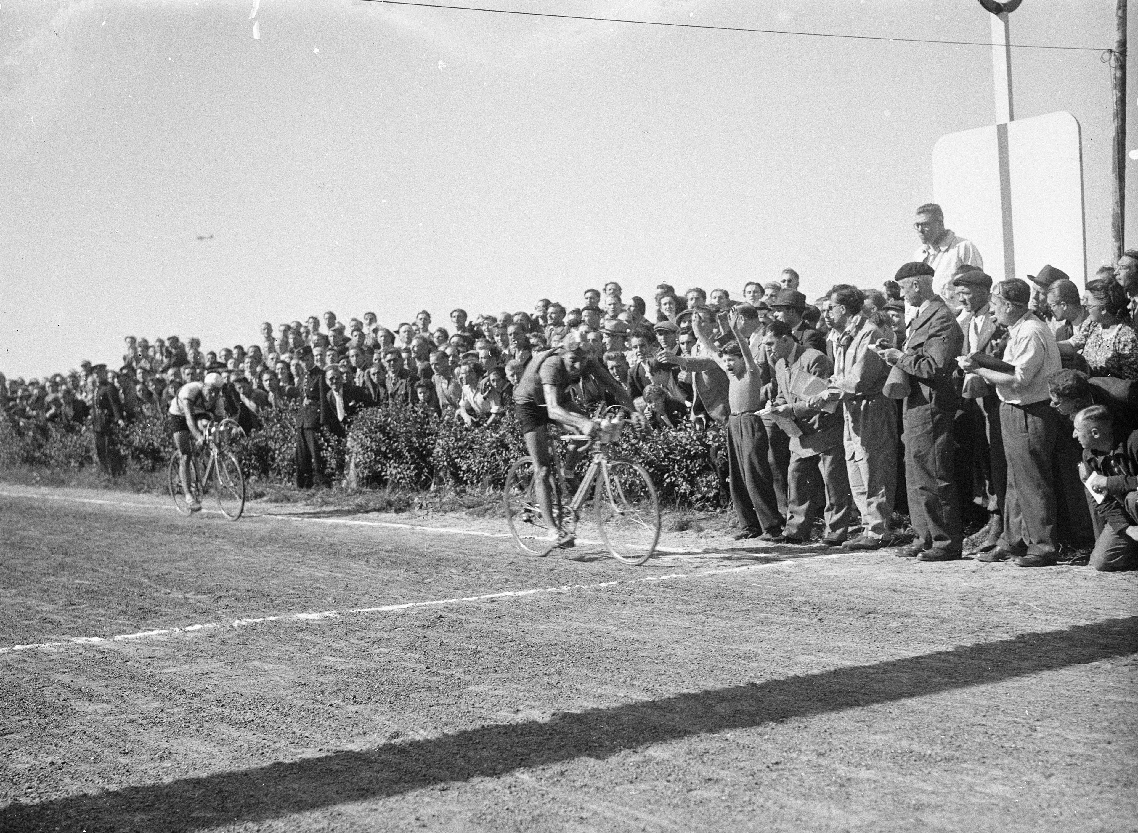 Collectie / Archief : Fotocollectie Anefo Reportage / Serie : Tour de France. Eerste etappe Parijs-Rijssel (Lille) Beschrijving : Nummer een en twee komen binnen, Ferdi Kübler (Zwitserland) gevolgd door Mahé (Frankrijk) Datum : 25 juni 1947 Locatie : Frankrijk, Lille Trefwoorden : wielrennen Persoonsnaam : Kübler, Ferdy Fotograaf : Sagers, Harry / Anefo Auteursrechthebbende : Nationaal Archief Materiaalsoort : Glasnegatief Nummer archiefinventaris : bekijk toegang 2.24.01.09 Bestanddeelnummer : 902-2379